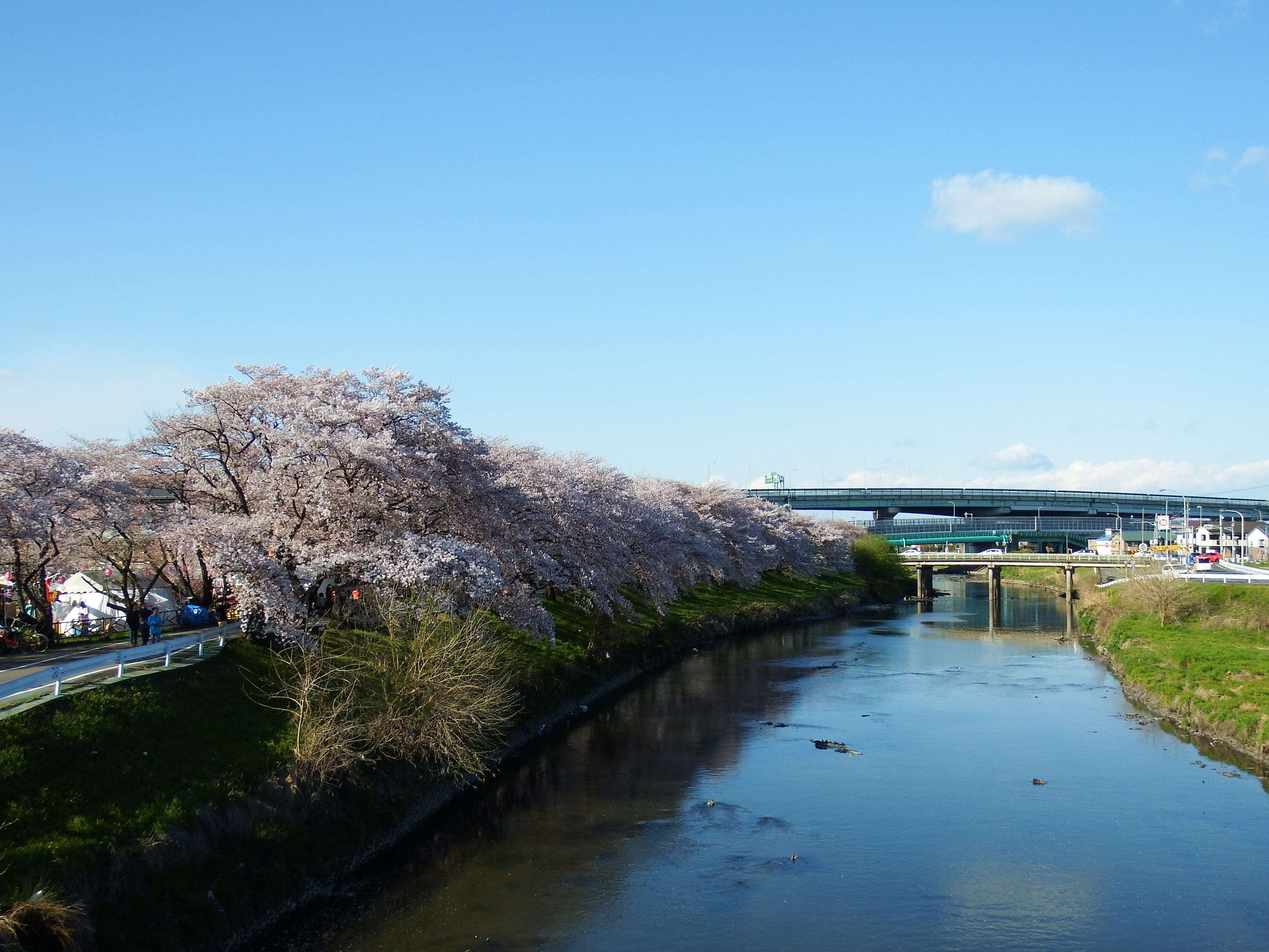 五条川の桜